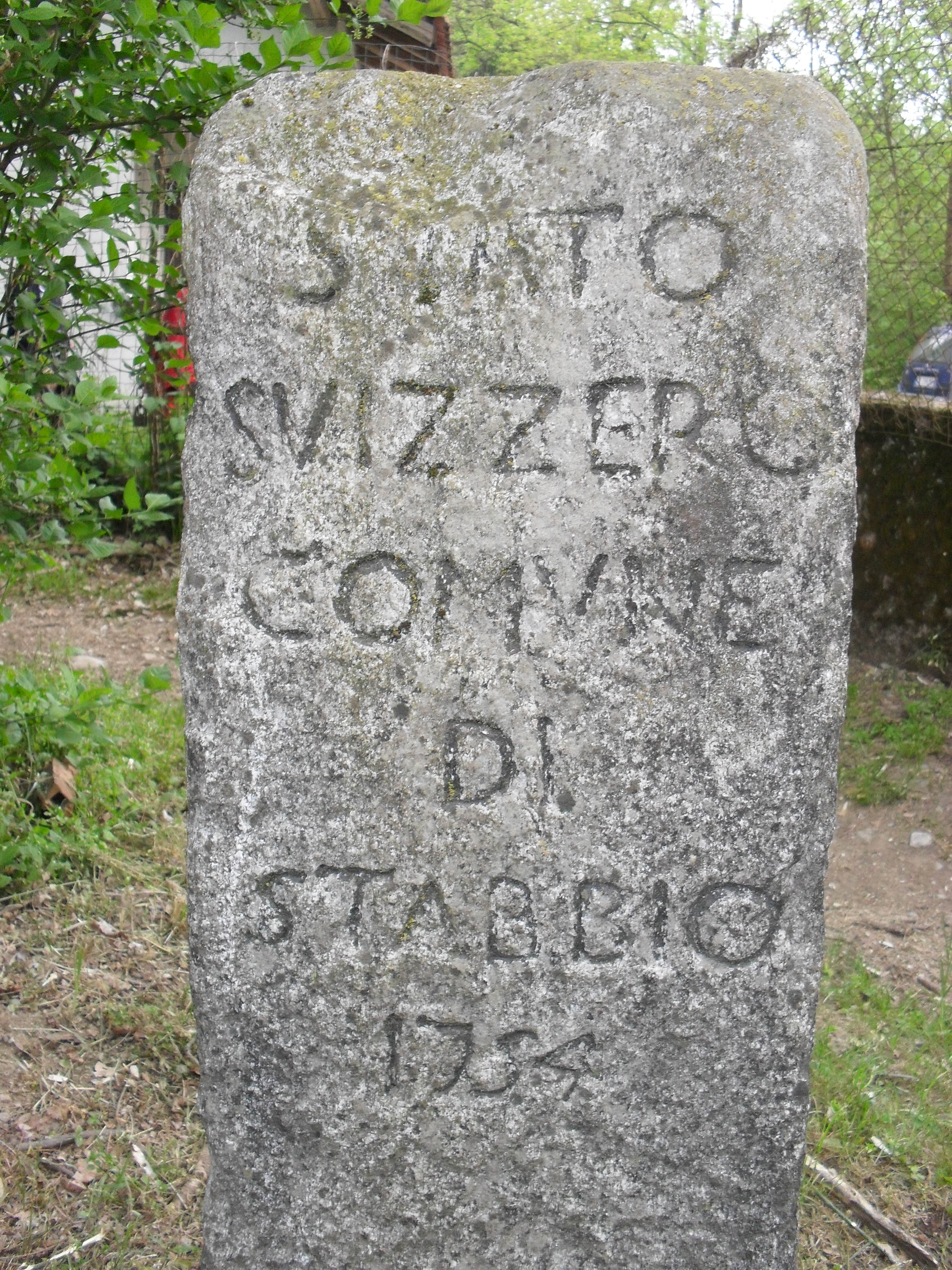 Cippo confinale da Svizzera (Stabio)